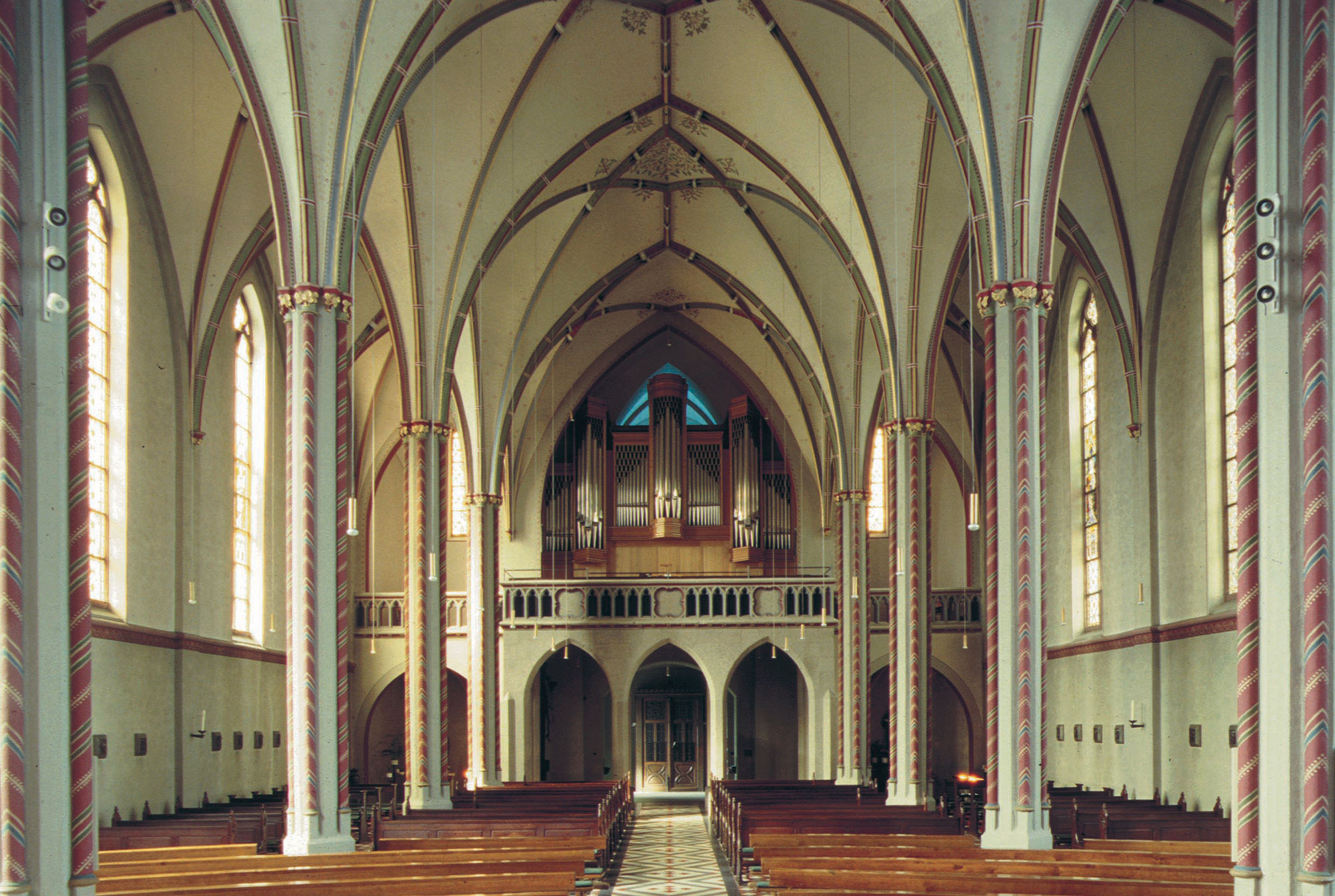 Aachen-Brand: Kath. Pfarrkirche St. Donatus (1879-83), Innenraum nach Westen